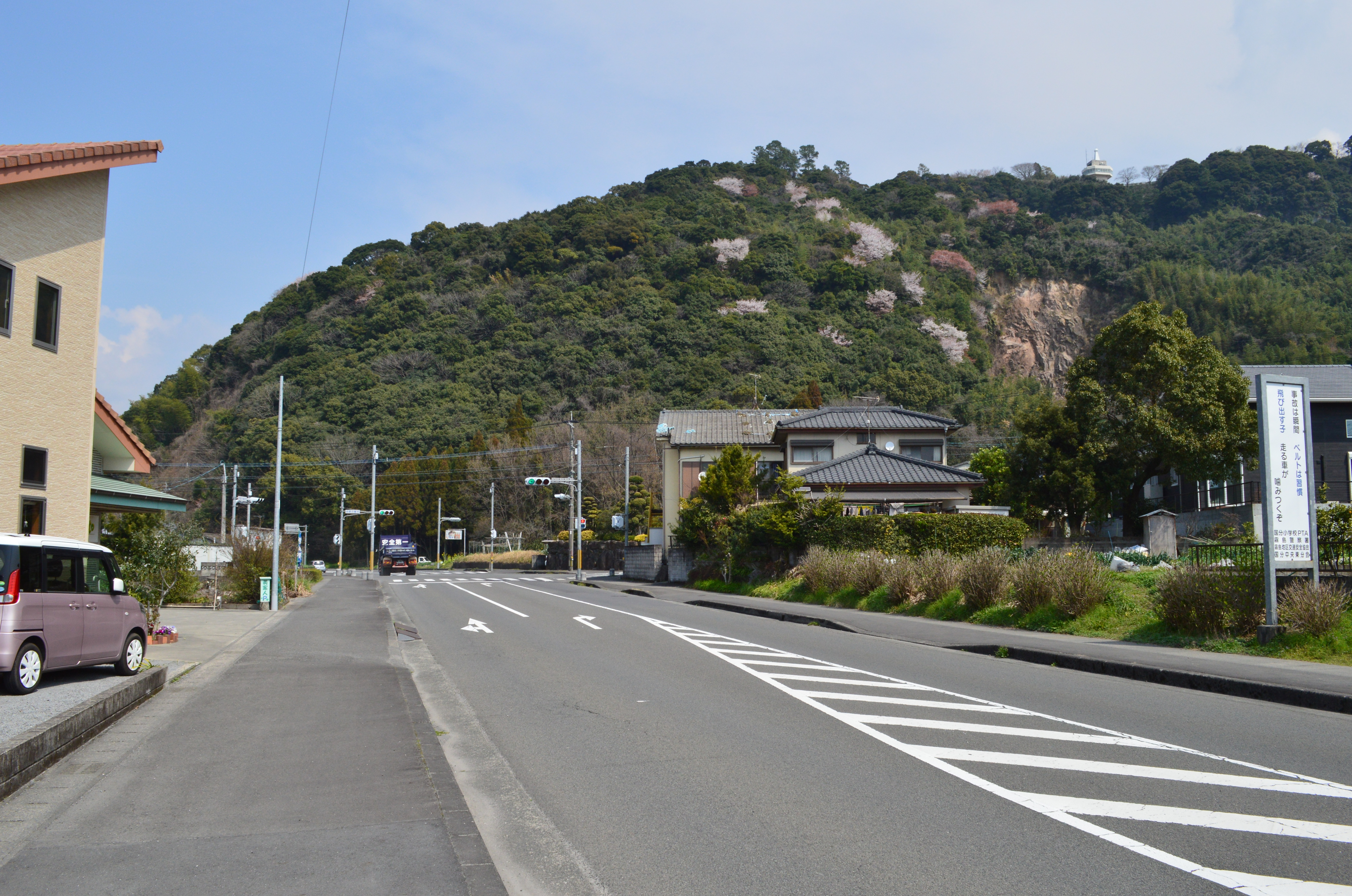 金剛寺駅跡